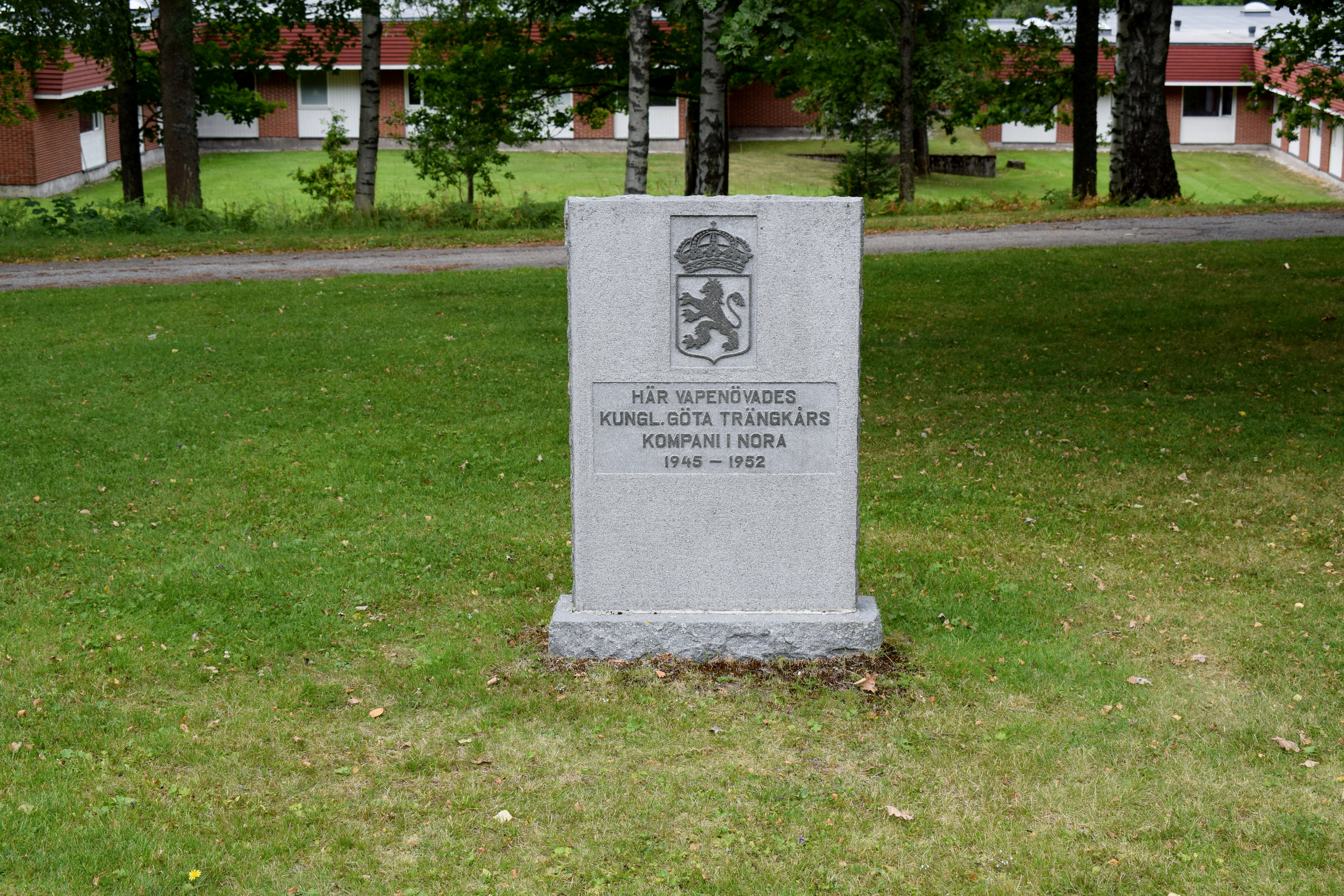 Minnessten för Göta trängregementes kompani i Nora. Minnesstenen avtäcktes den 19 oktober 1985 vid infarten till det före detta kasernetablissementet vid Norvalla IP i Nora. På stenen är det ristat "Här vapenövades Kungl. Göta trängkårs kompani i Nora 1945–1952.